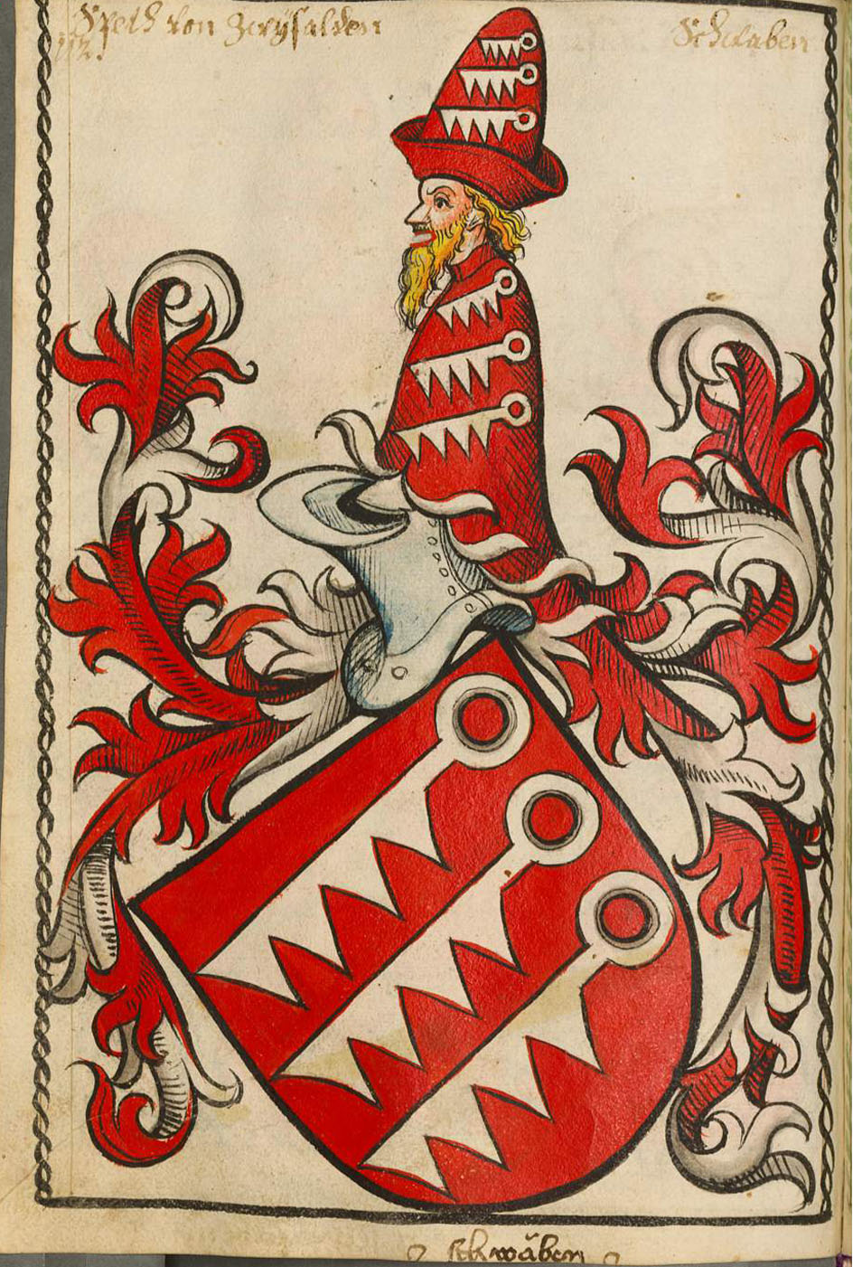 Scheibler'sches Wappenbuch , älterer Teil Speth von Zwiefalten